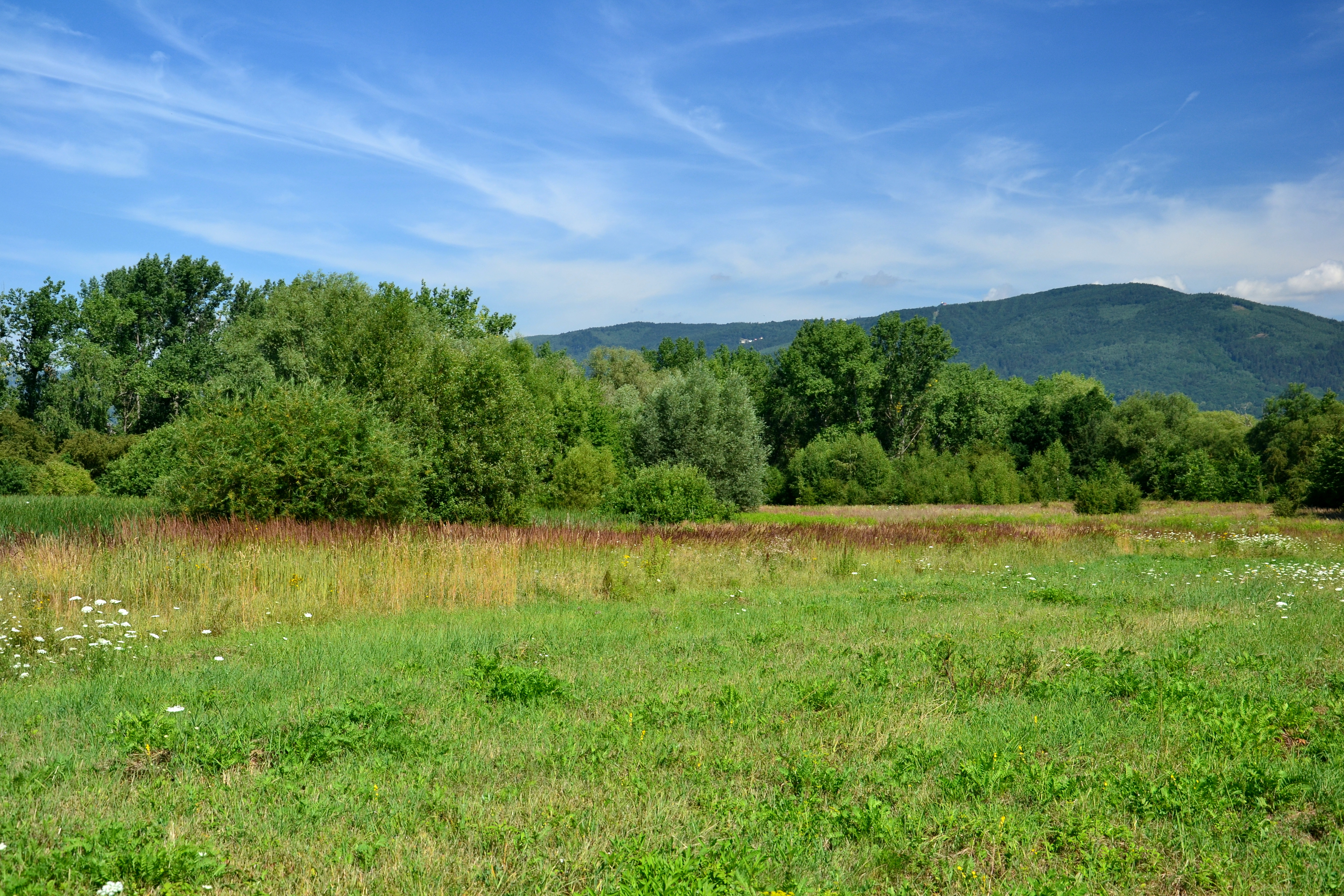 PP Kateřina - mokřad (od východu)